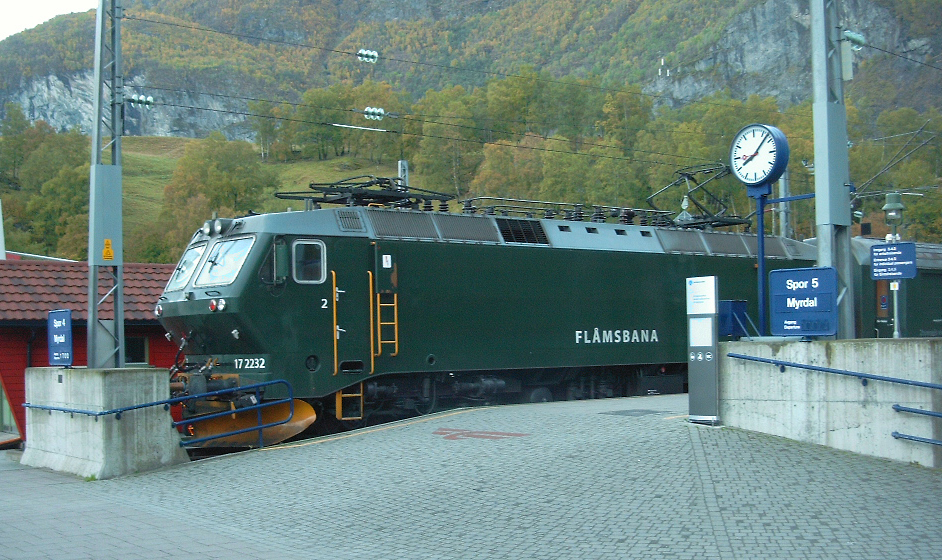 Flambahn_2004